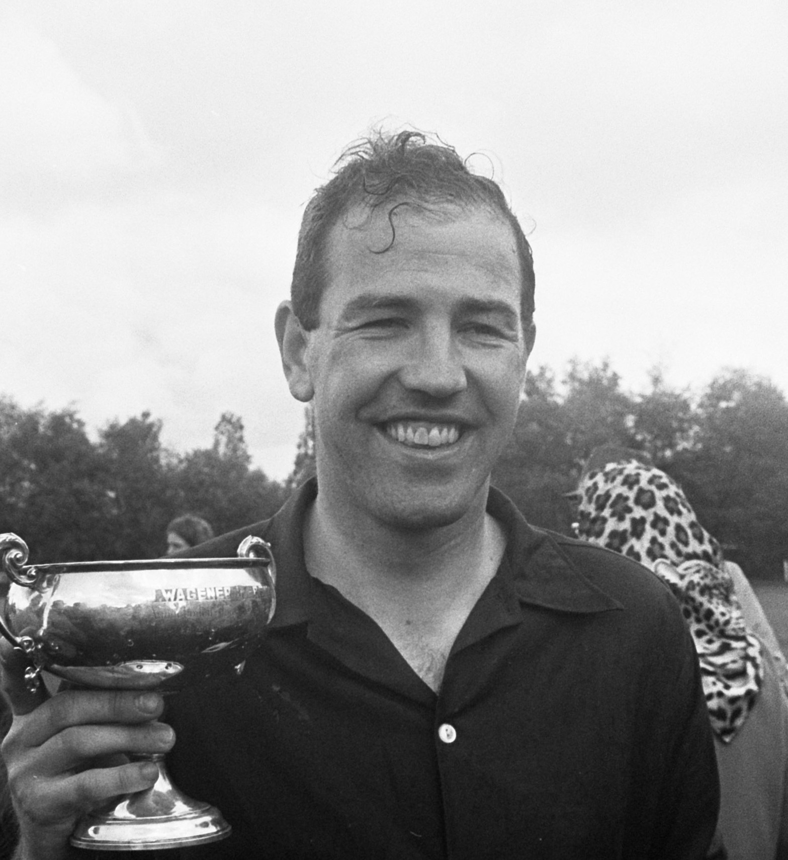 Hockey Laren tegen Venlo 2-0 J.P. Fokker met beker